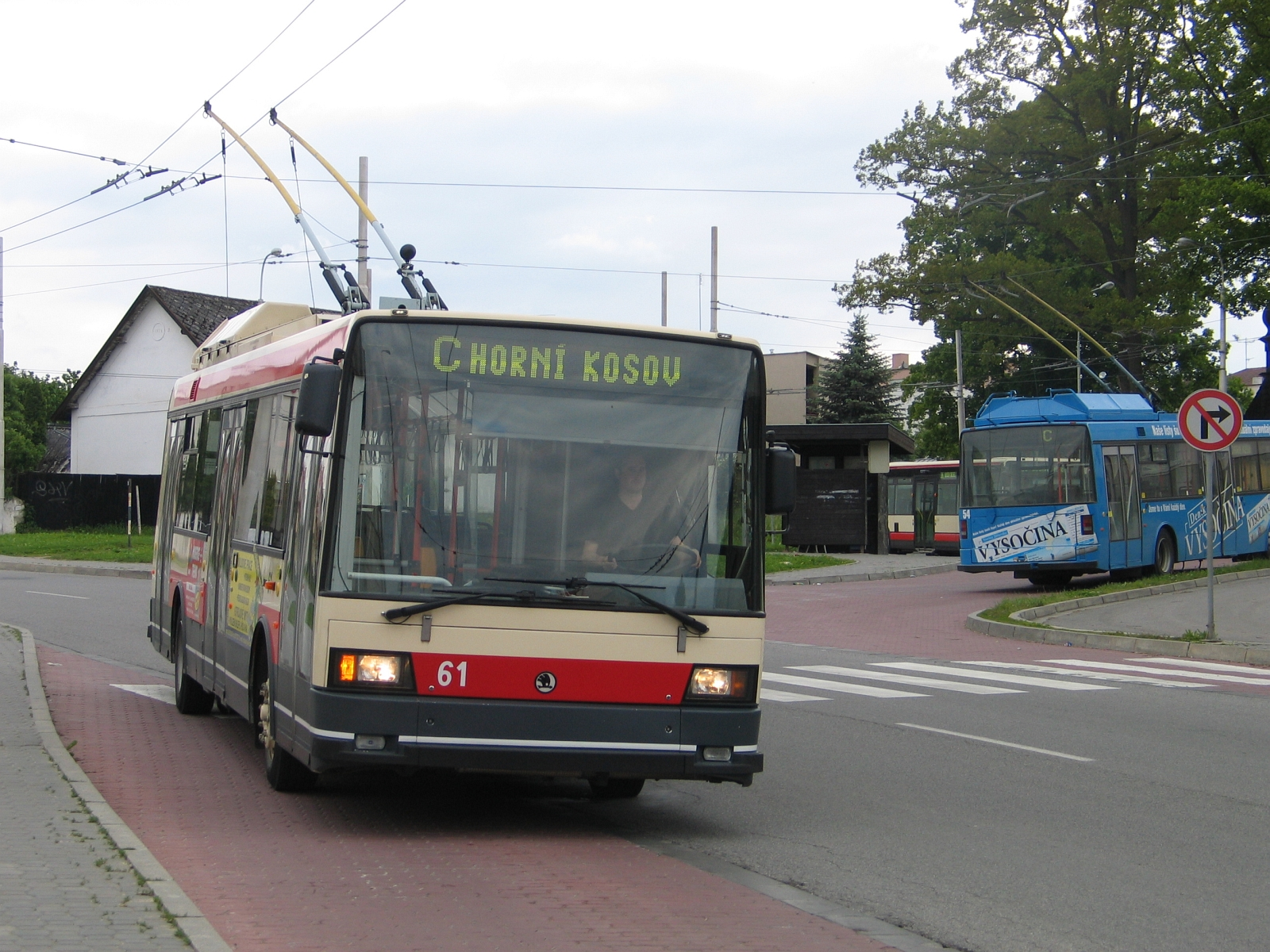 Škoda 21 Tr, Jihlava